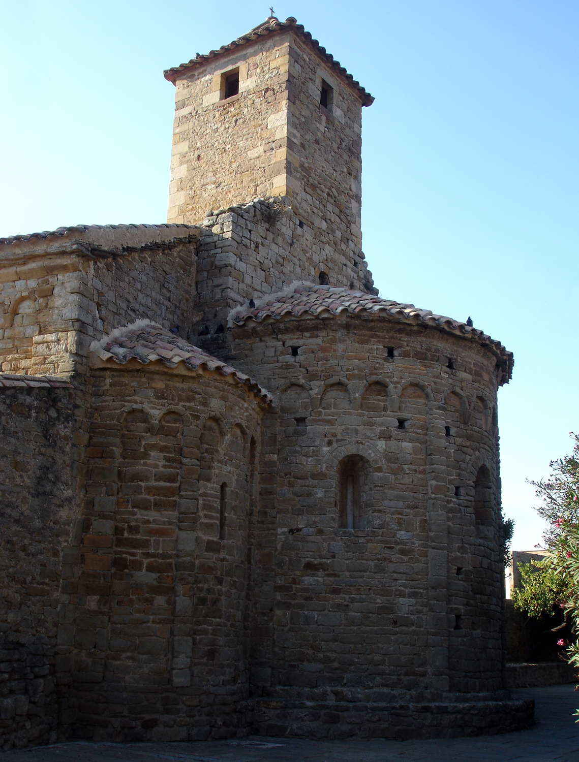 Eglèsia de Sant Pere d'Ullastret (Girona, Catalunya, Espanya)